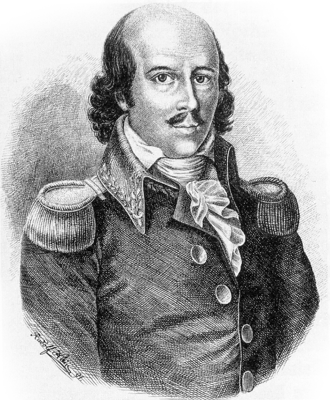 Rudolf Eickemeyer: Kurmainzer Militär, französischer General, Politiker